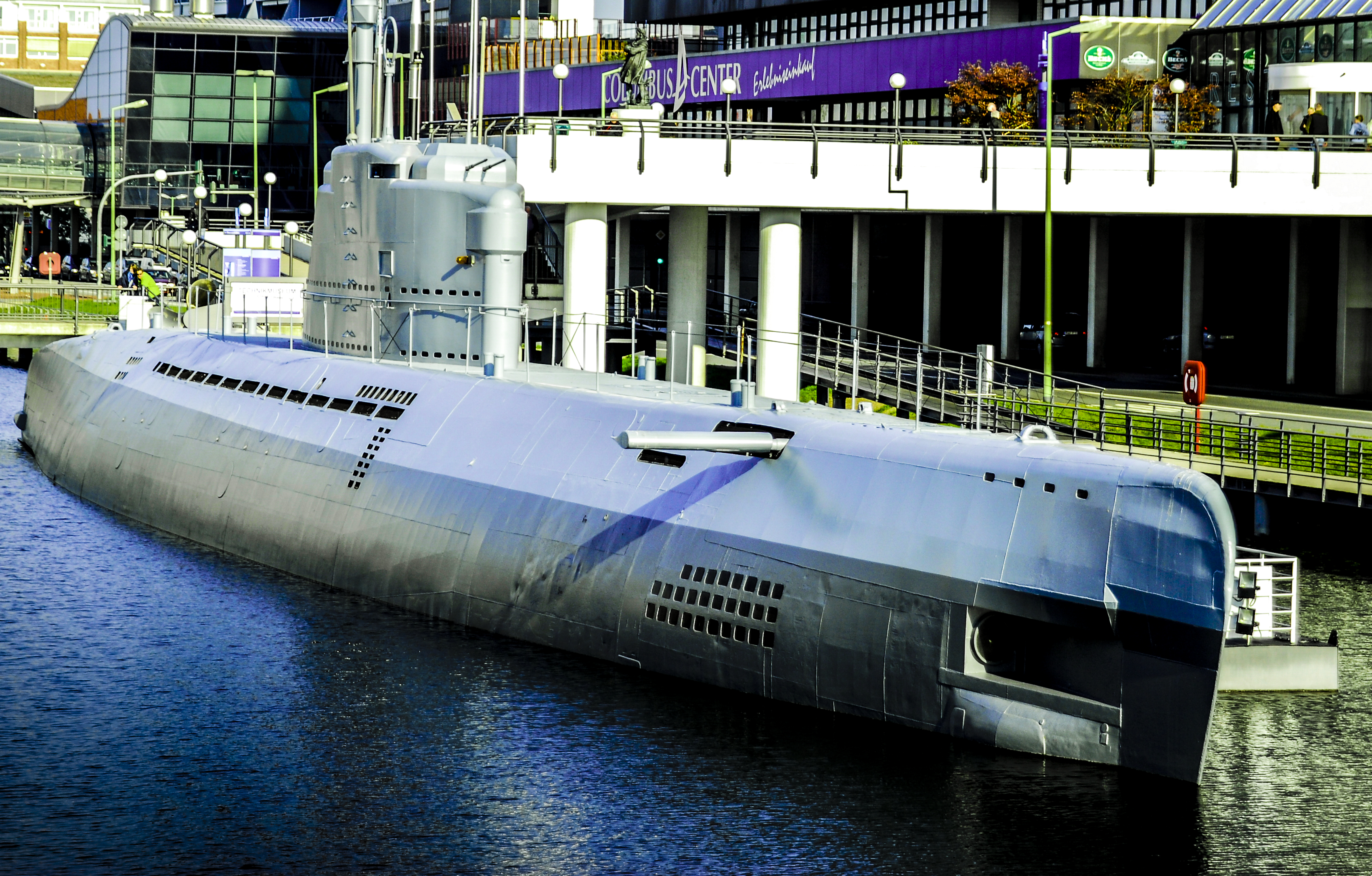 Am 13.011945 bei der Hamburger Werft Blohm und Voss unter dem Namen U2540 vom Stapel gelaufen, gehörte zur 31. U-Flottillie und wurde im Mai 1945 in der Flensburgs Förde selbst versenkt. Im Januar 1957 wurde es wieder gehoben und instand gesetzt. Das Boot wurde 1. September 1960 von der Bundesmarine übernommen und auf den Namen Wilhelm Bauer getauft. Dort diente es als Erprobungsboot Am 15.03.1982 wurde es dann endgültig ausser Dienst gestellt und vom Kuratorium Deutsches Schifffahrtsmuseum und dem Förderverein Deutsches Schifffahrtsmuseum übernommen